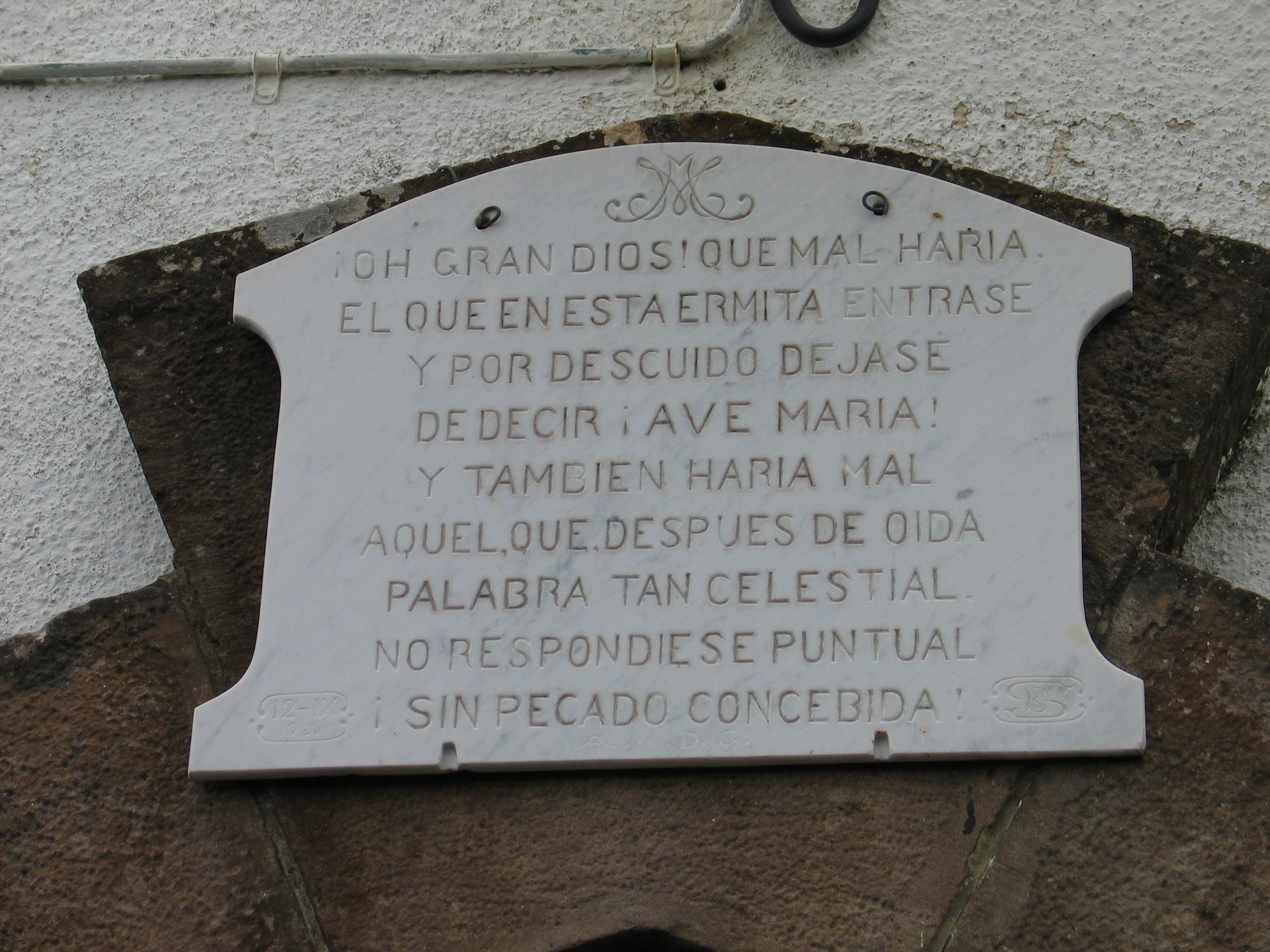 Baselizaren sarreran dagoen plaka.